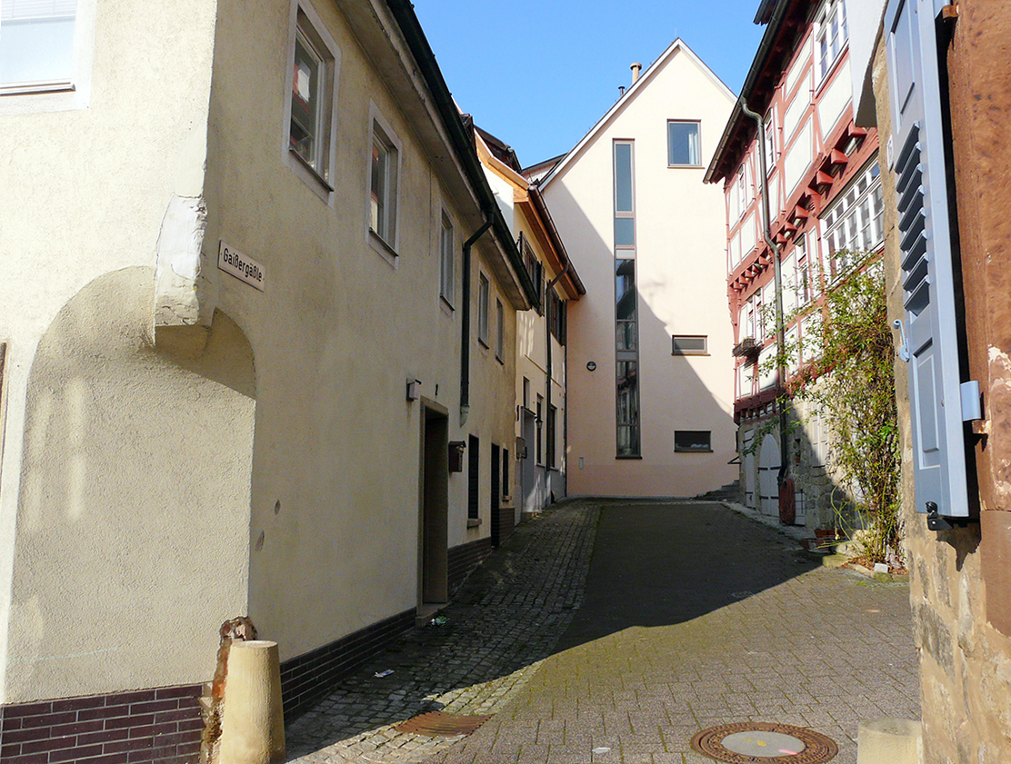 Gaißer-Gässle in Markgröningen, südöstlich des Kirchplatzes